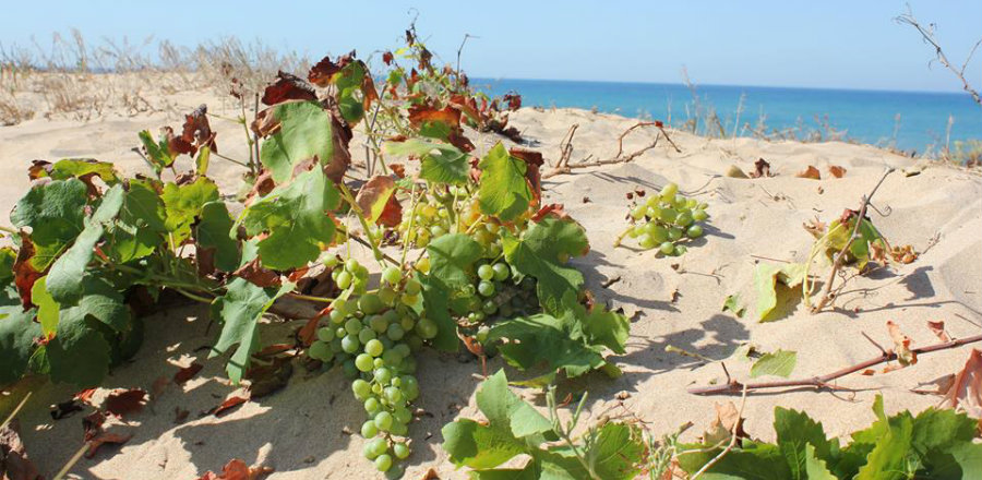 L'inzolia cresce sulla spiaggia di Menfi. Foto di Filippo Buttafuoco.